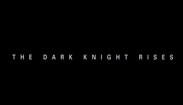 Batman 3